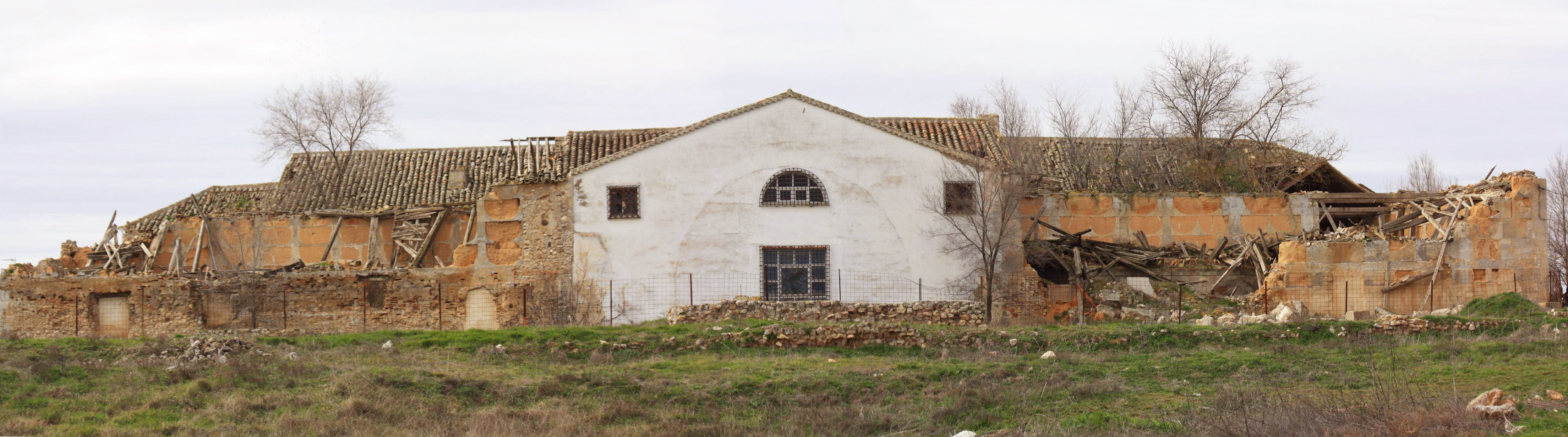 Casa de Postas de Tembleque - Vue arrière en ruine